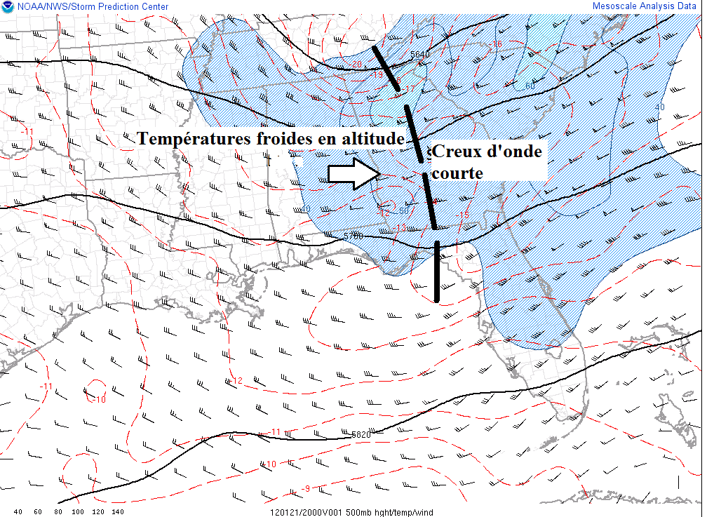 Le 21 janvier 2012, un creux d'onde courte important a traversé le sud-est de États-Unis en après-midi pour atteindre la côte atlantique le soir. Les températures de surface dans le sud-est de la Georgie étaient entre 20 et 25 C et les points de rosée dans la dizaine de degrés. Même si l'instabilité de l'air n'était pas extrême, l'onde courte a permis de déclencher des lignes de grain orageux causant des dommages, surtourt par la grêle de grosseur de balle de golf.